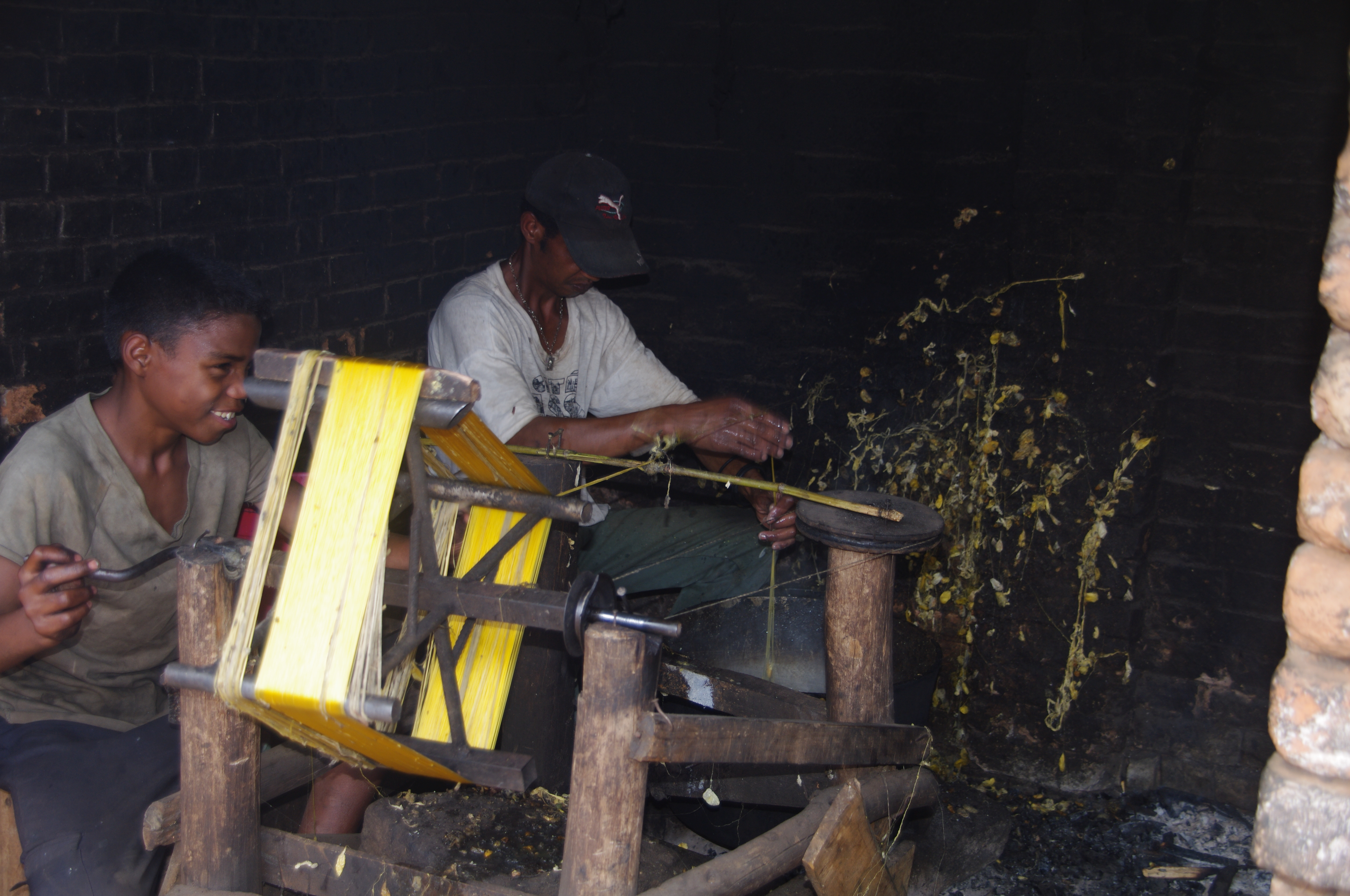 Extraction du fil.